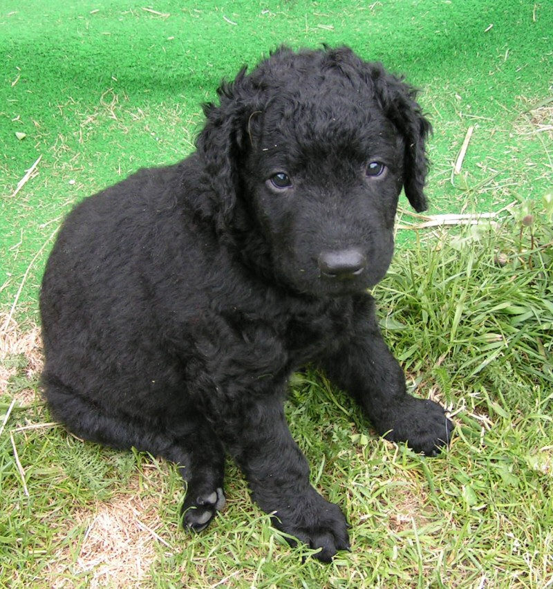 Curly Coated Retriever-Welpe